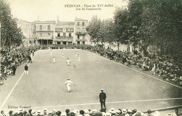 photo d'un match de jeu balle au tambourin, avant la Première Guerre mondiale. Ce cliché fut publié sous forme de carte postale avant 1915 ( Ce cliché ne porte pas de mention sur l'identité du photographe mais seulement le nom de l'éditeur de cartes postales : "Edition Gascard". C'est donc un cliché dit "anonyme" qui tombe dans le domaine public en France 70 ans après sa publication. User:Clio64